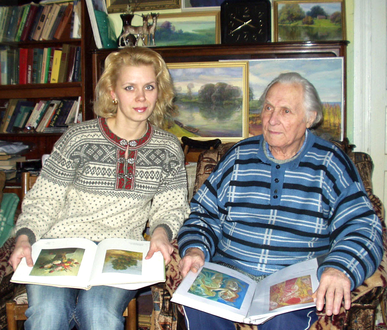 Елена Ильина со своим наставником - художником Петром Явичем (учеником Ю. Пэна) в его мастерской (г. Витебск)